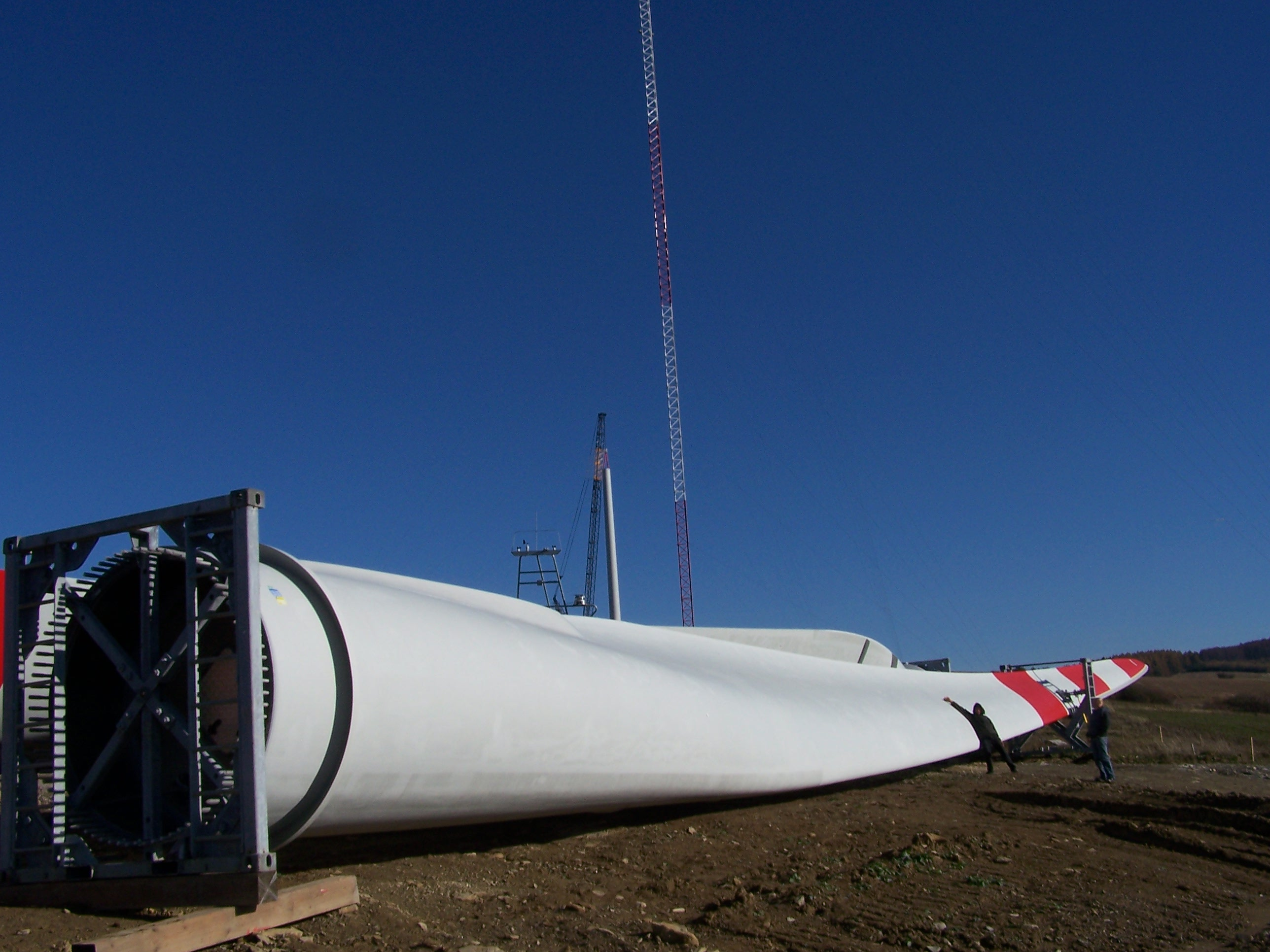 Budowa farmy wiatraków w Bukowsku